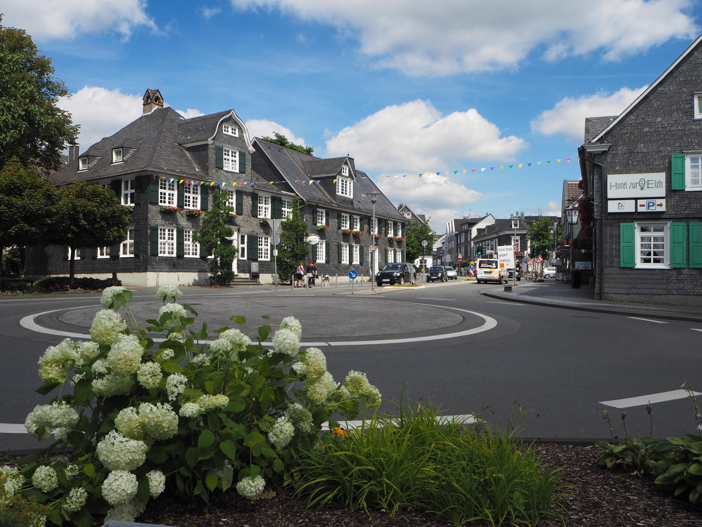 Wermelskirchen (NRW), Straßenszenerie Eich , Foto: Juli 2015